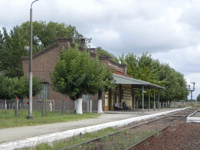 Conjunto Ferroviario Mechita